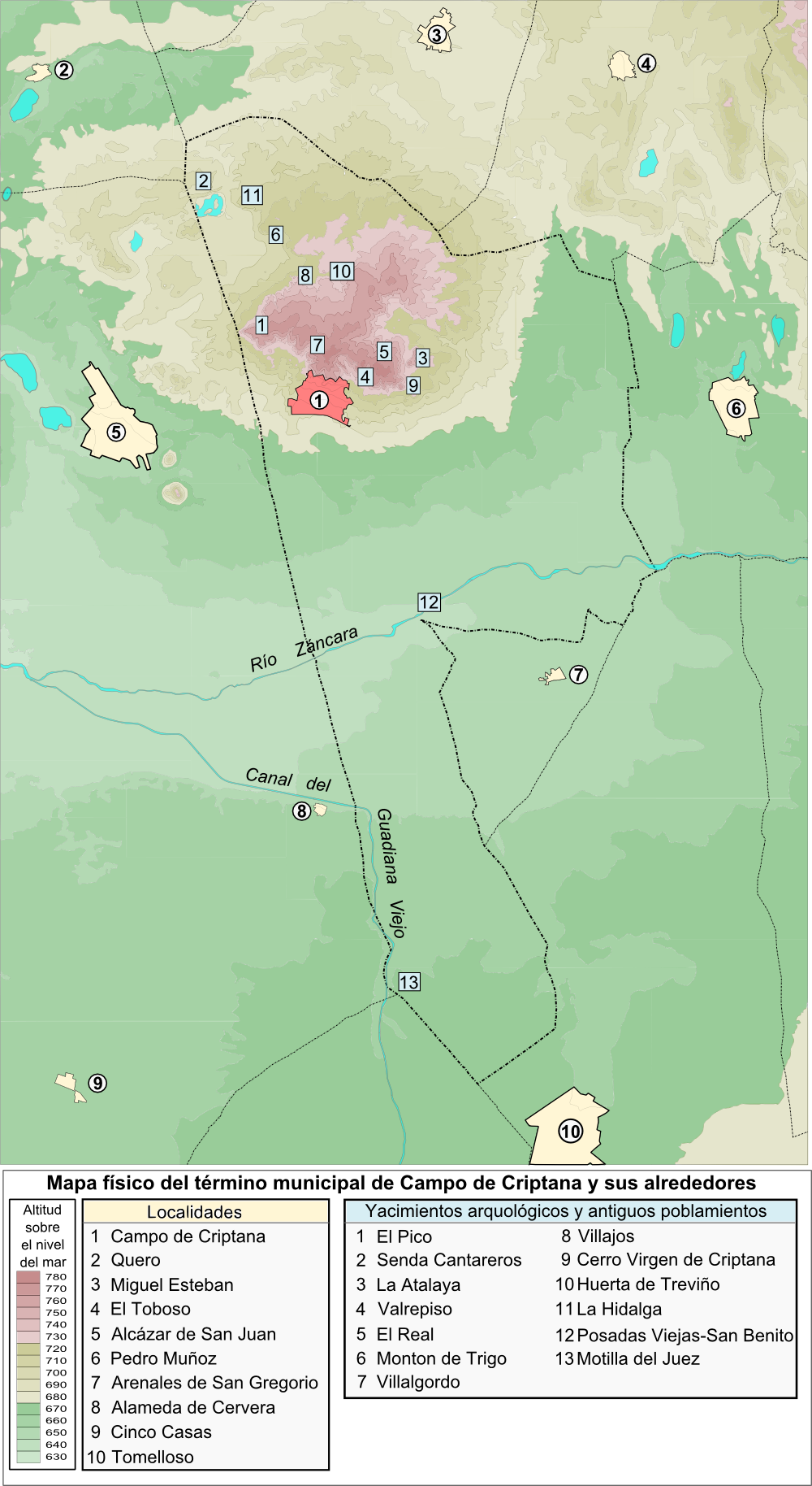 Mapa físico de Campo de Criptana con indicación de los yacimientos arqueológicos y antiguos poblamientos